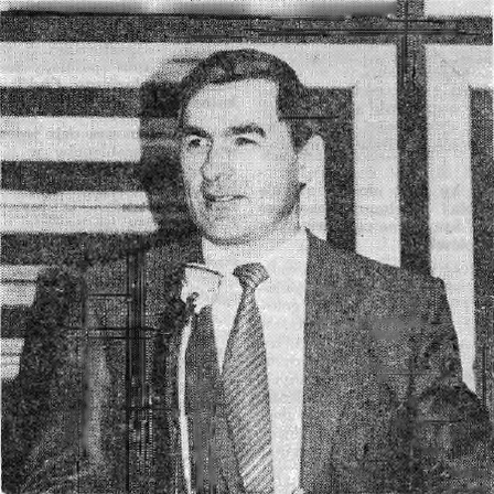 Michał Hydzik, fotografia zamieszczona w "Chrześcijaninie" 1989 nr 1 s 5